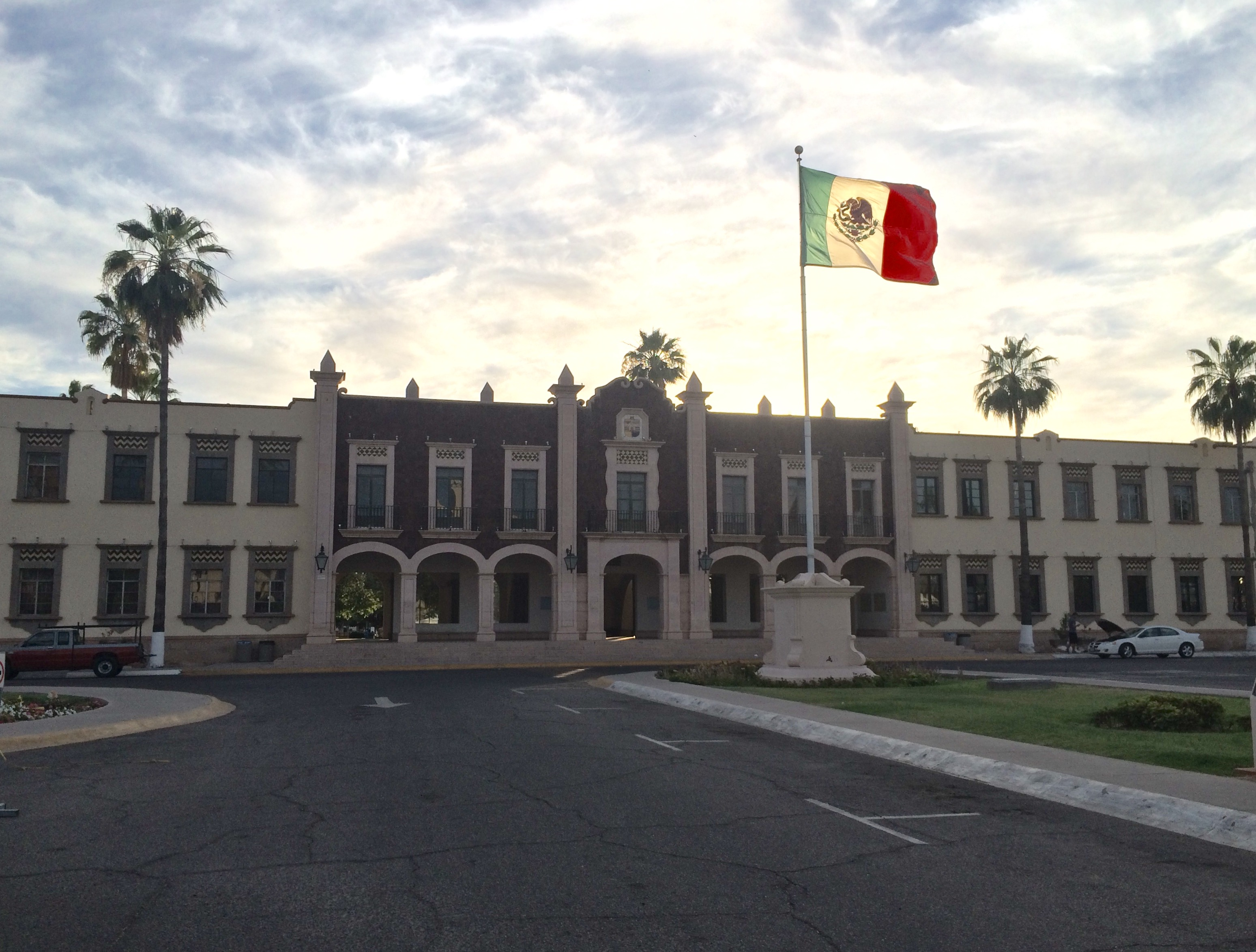 El edificio principal de la Universidad de Sonora, Unidad Regional Centro, en Hermosillo, Sonora, México.